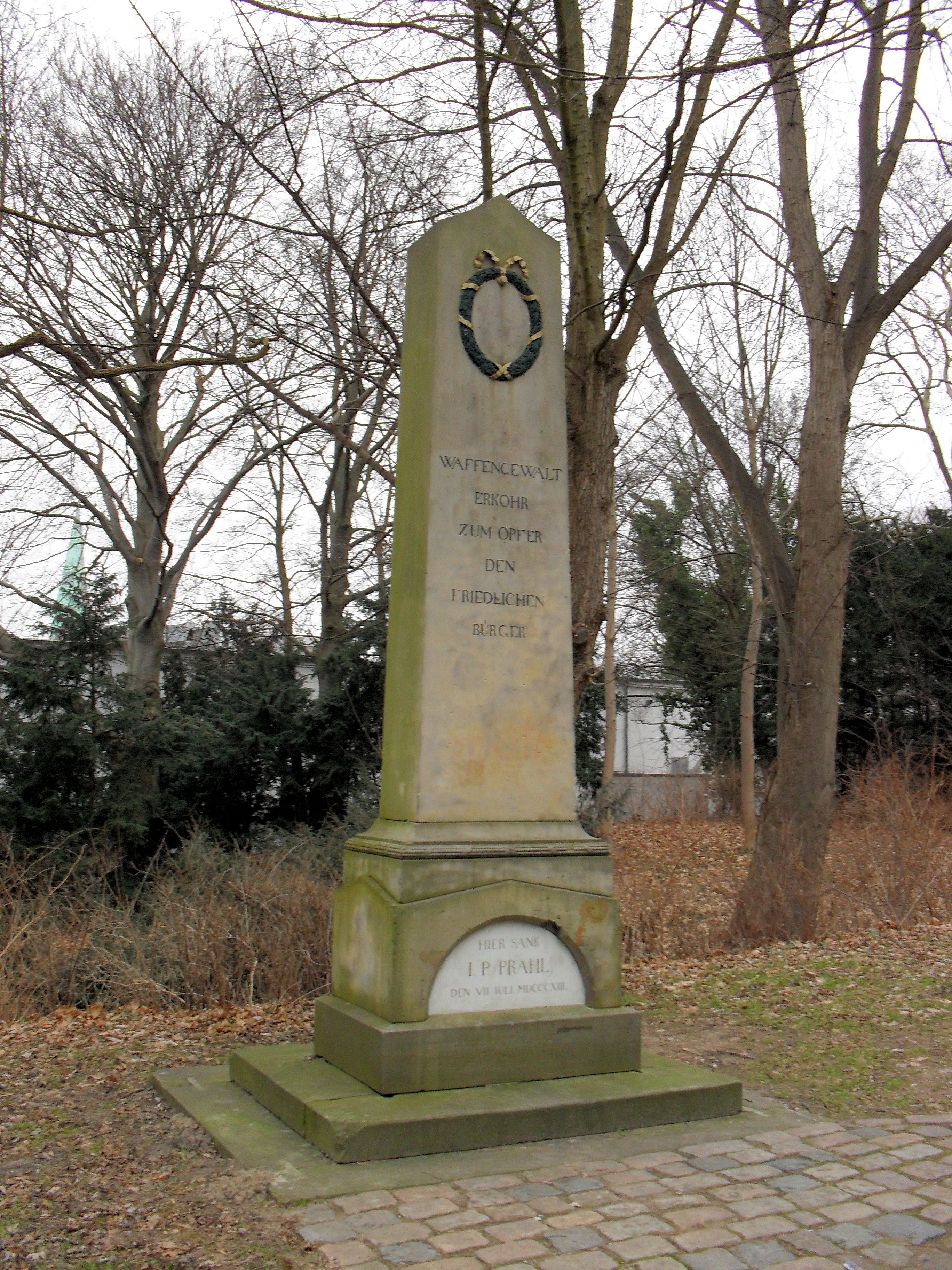 Die Vorderseite des Prahl-Denkmals in Lübeck